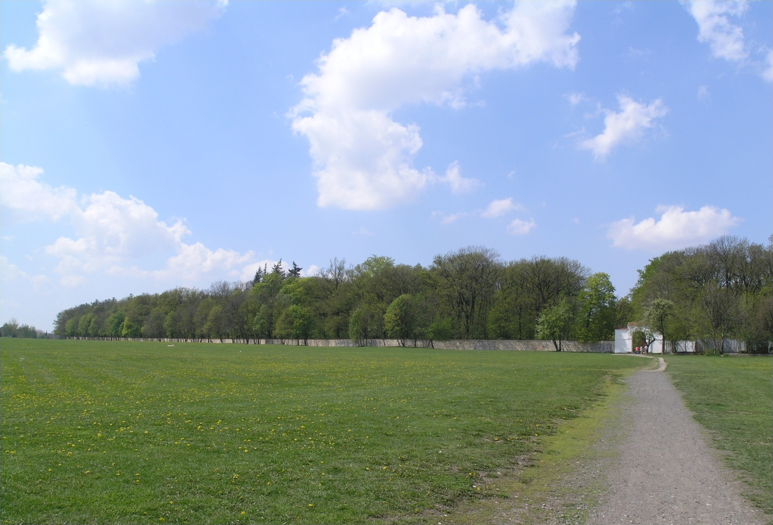 Obora Hvězda od Vypichu